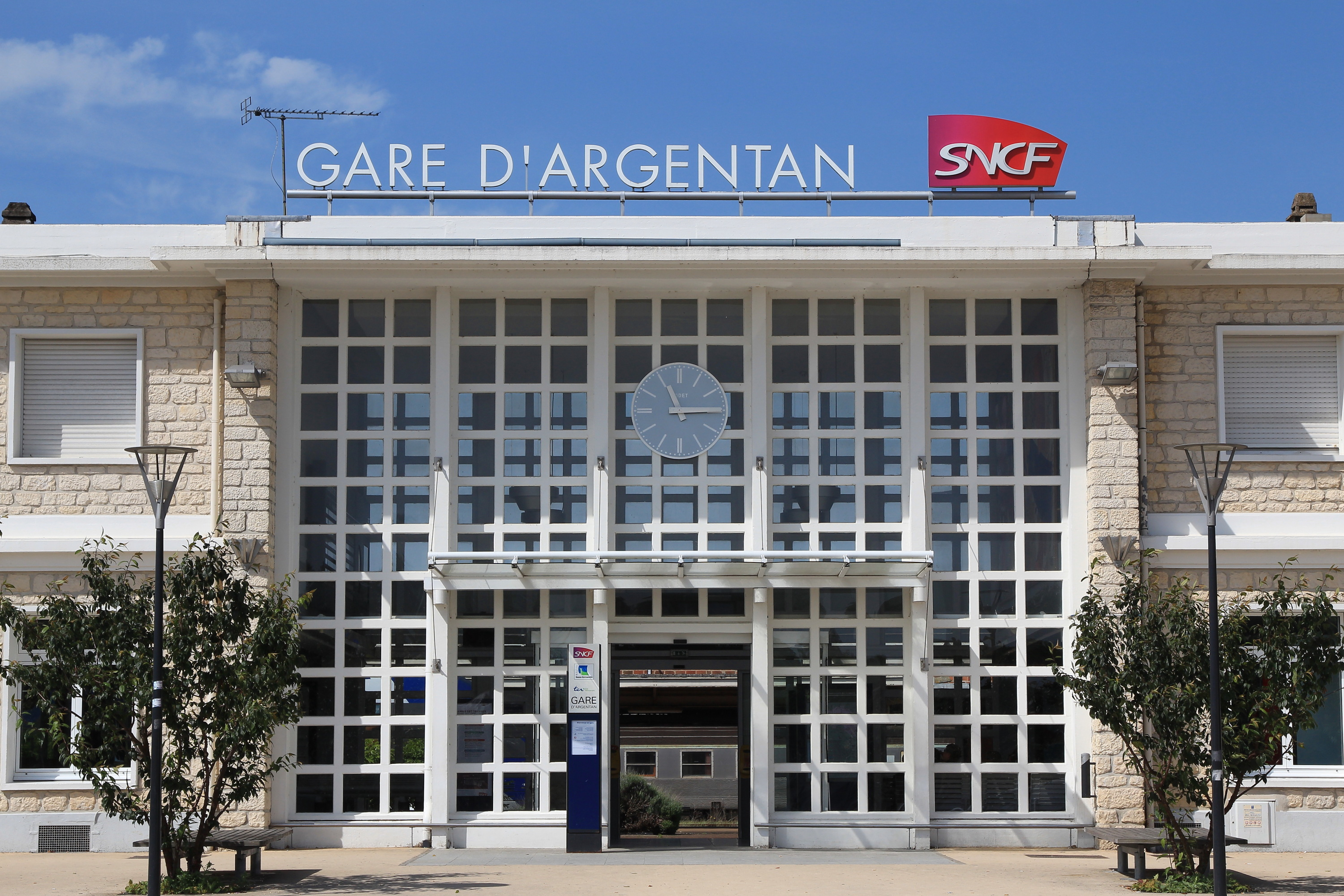 Vue du bâtiment voyageurs de la gare d'Argentan, côté cour